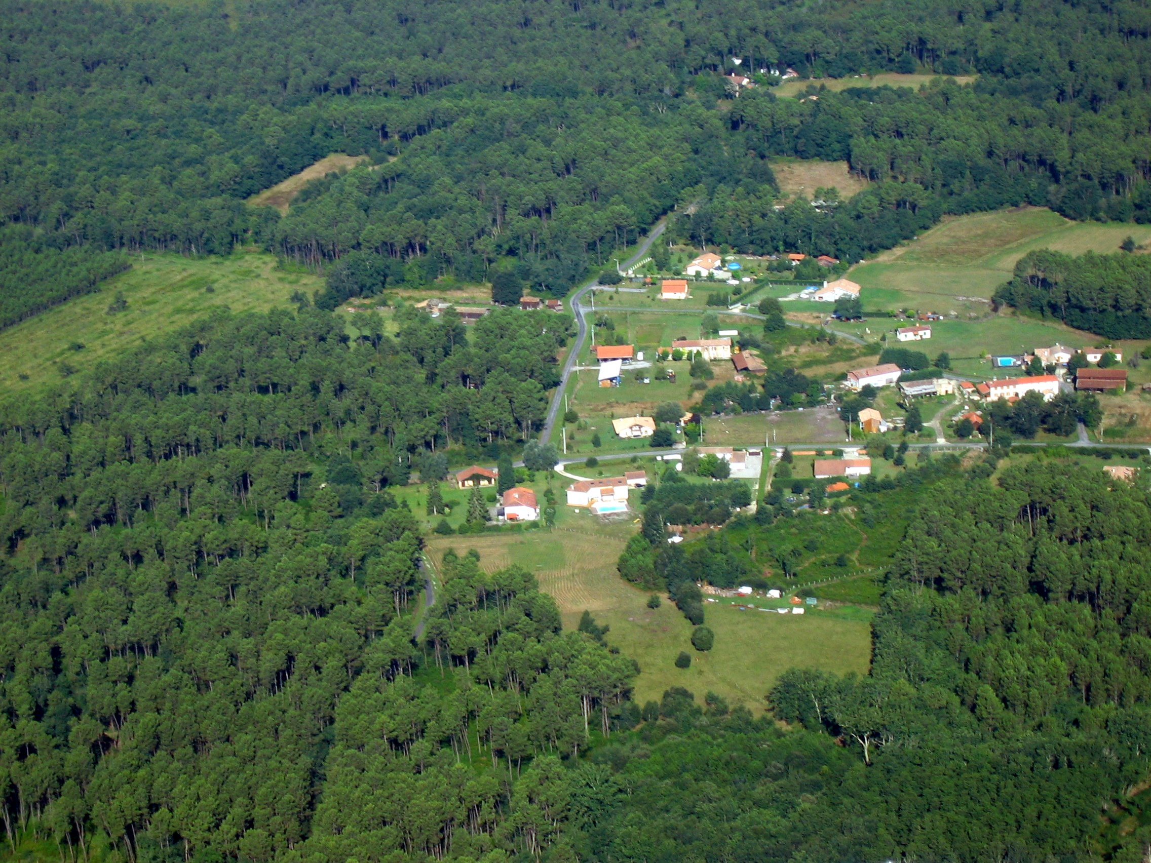 Vue aérienne de Gassian (Mios, Gironde, Aquitaine, France)